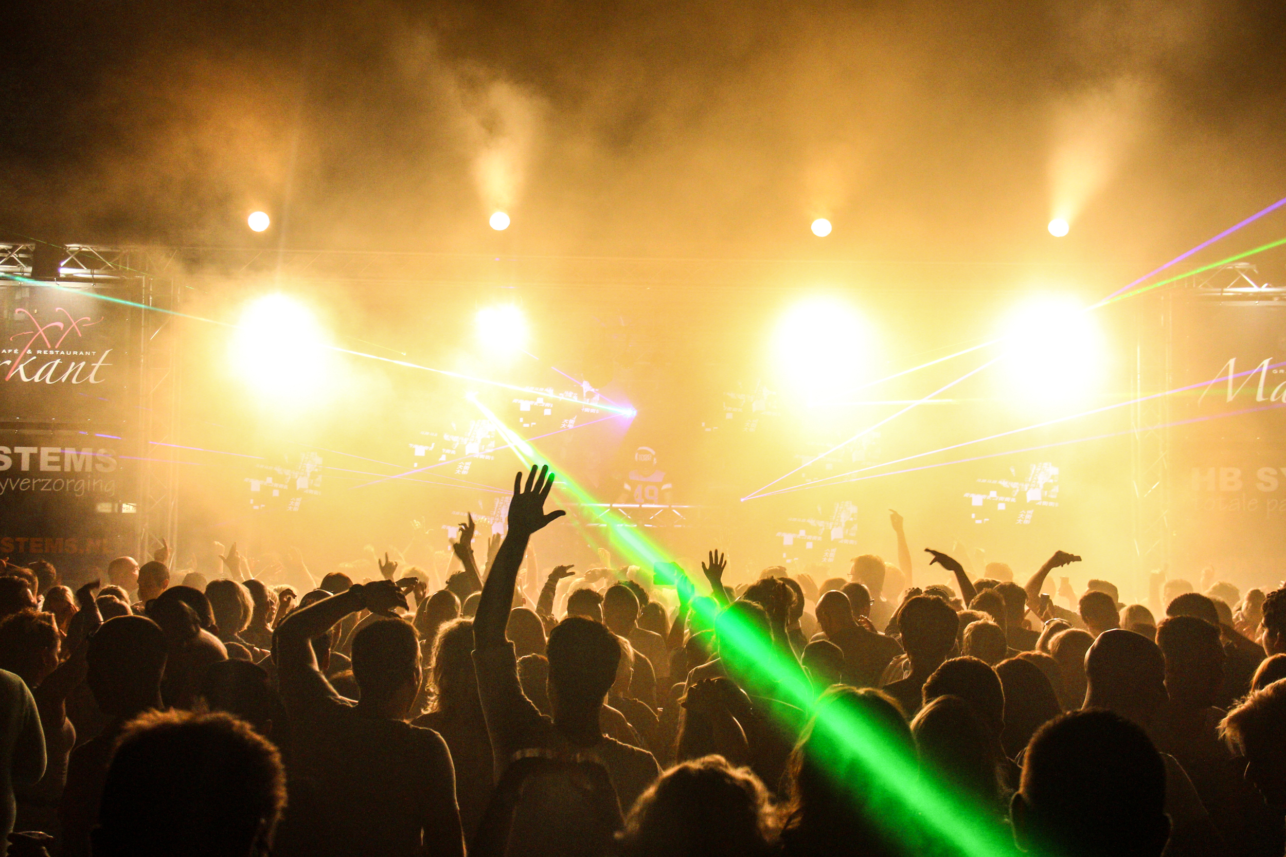 DJ Jean tijdens een optreden bij C'est la Vie 2014 in Emmen